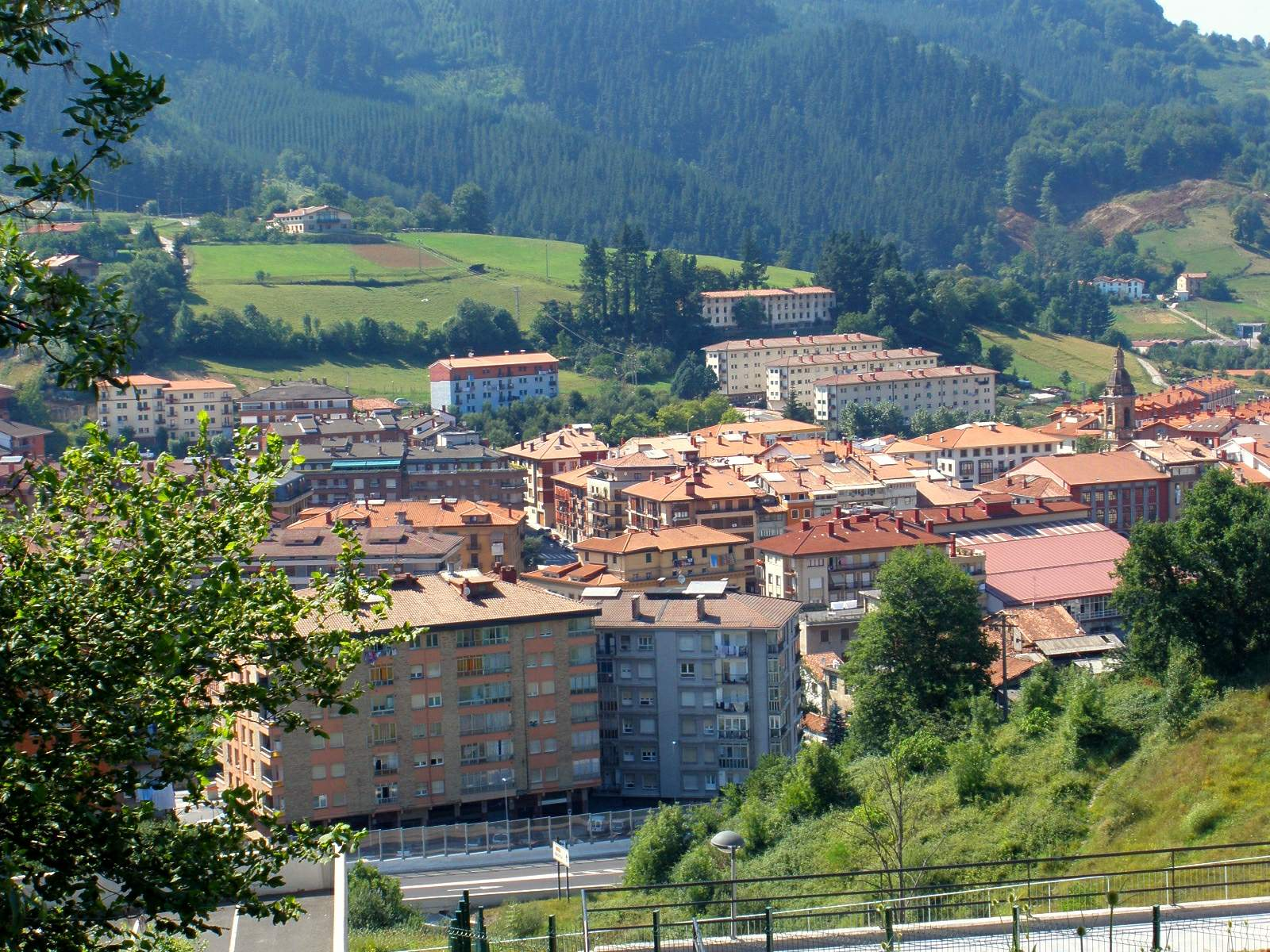 Vista de las poblaciones contiguas de Zumárraga y Urretxu, en Guipúzcoa